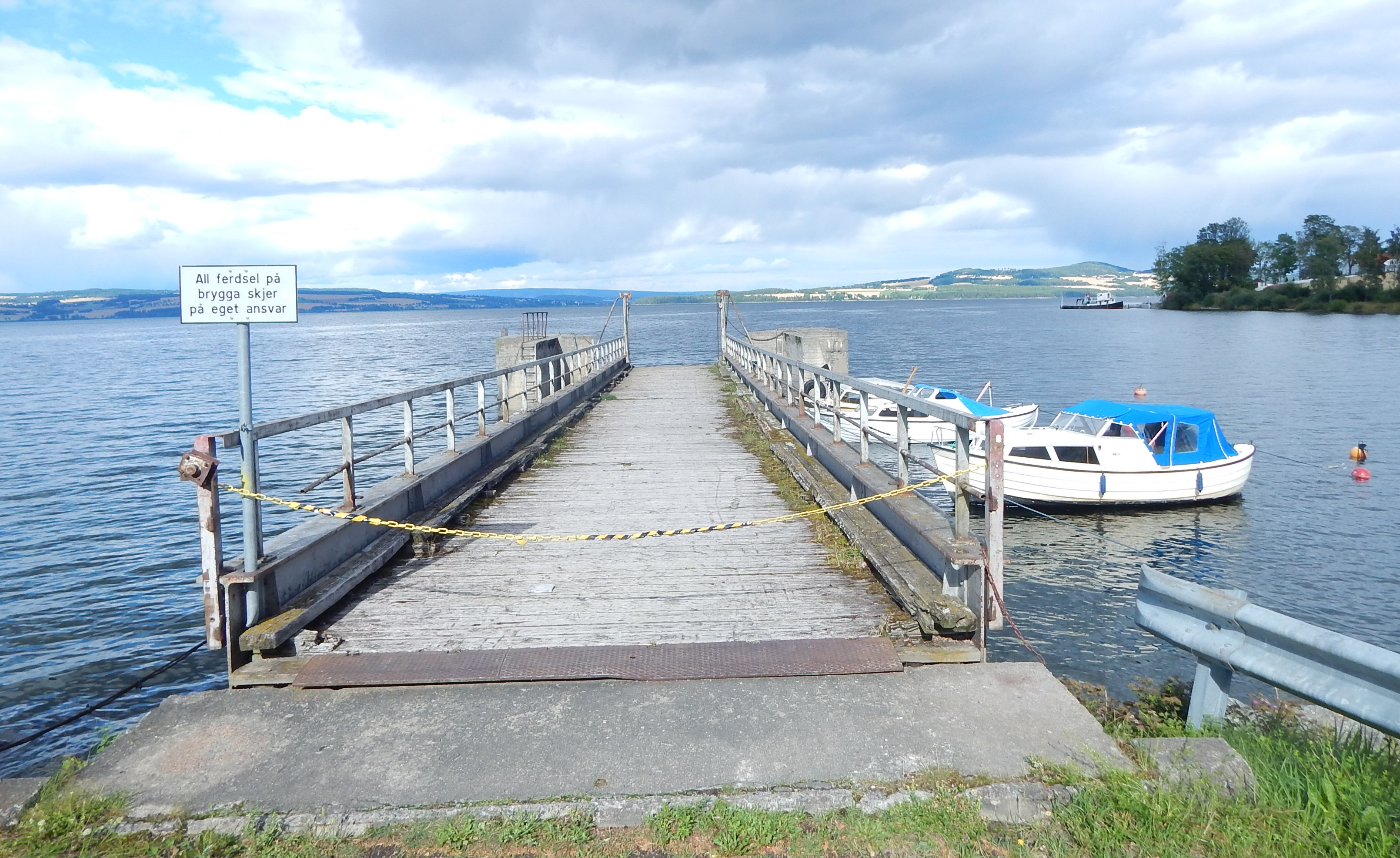 Brygge på Kapp